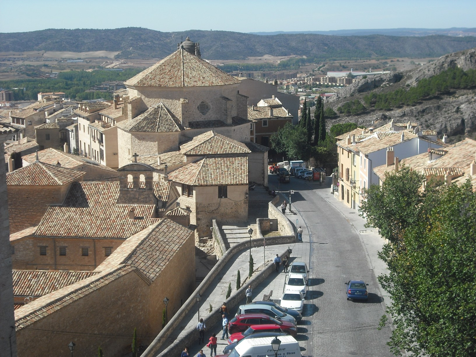 Iglesia de San Pedro.